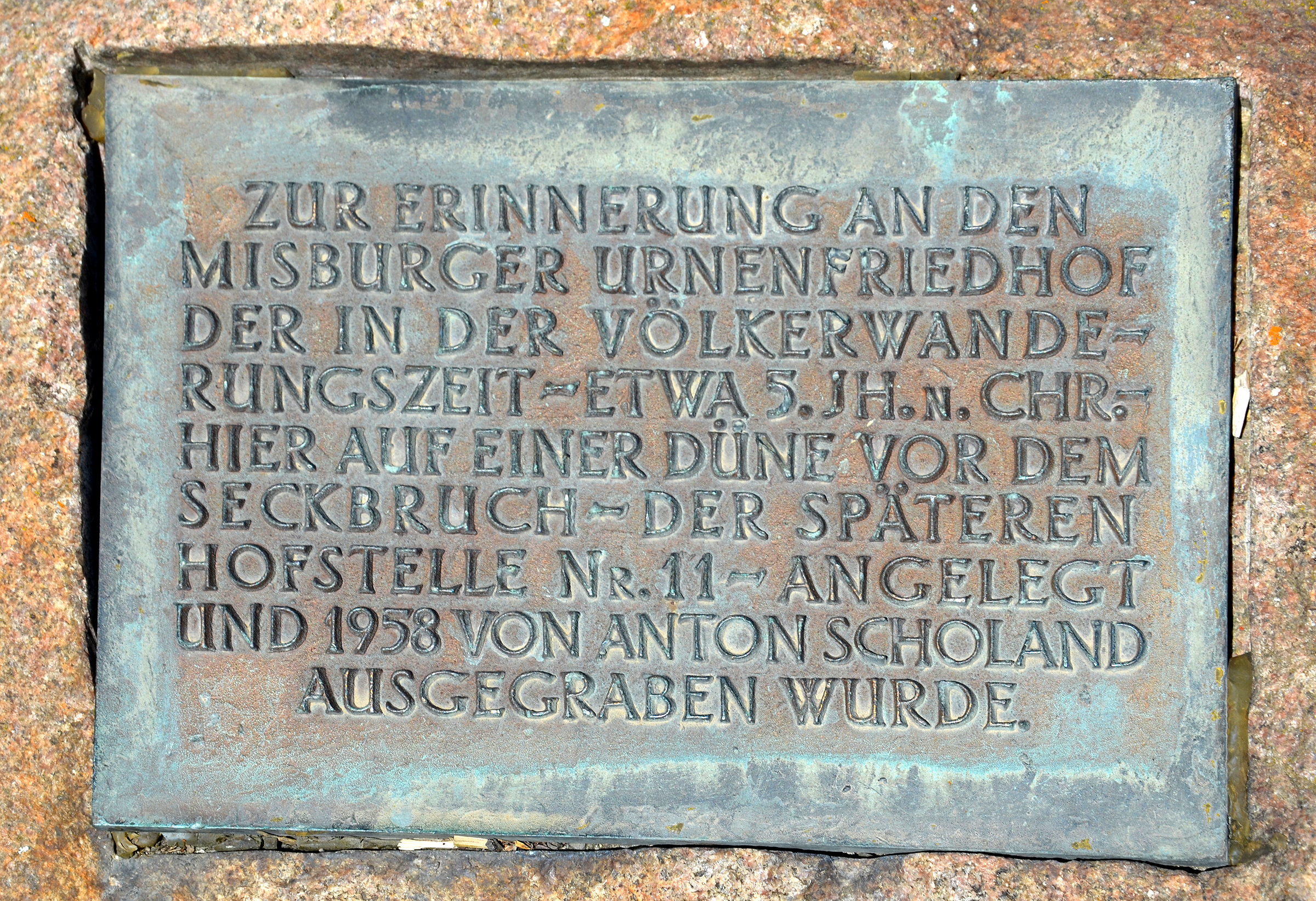 Eingelassen Informationstafel auf dem Findling an der Stelle des Misburger Urnenfriedhofs an der Anderter Straße in Hannover-Misburg: „Zur Erinnerung an den Misburger Urnenfriedhof (,) der in der Völkerwanderungszeit - etwa 5. Jh. nach Chr. - hier auf einer Düne vor dem Seckbruch - der späteren Hofstelle Nr. 11 - angelegt und 1958 von Anton Scholand ausgegraben wurde.“ ...